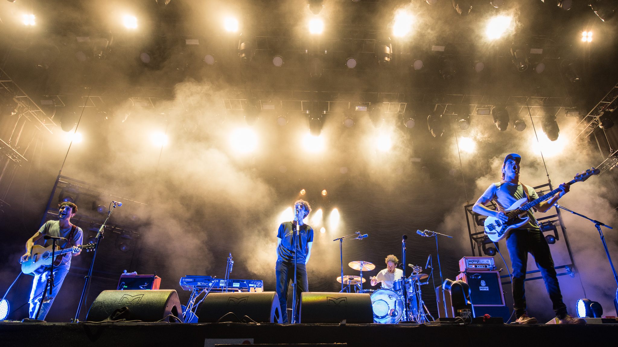 AMK,ARGO-Konzerte,AnnenMayKantereit,Beck's Park Stage,Christopher Annen,Henning May,Konzert,Livekonzert,Livemusik,Malte Huck,Musik,RiP,Rock im Park 2017,Severin Kantereit